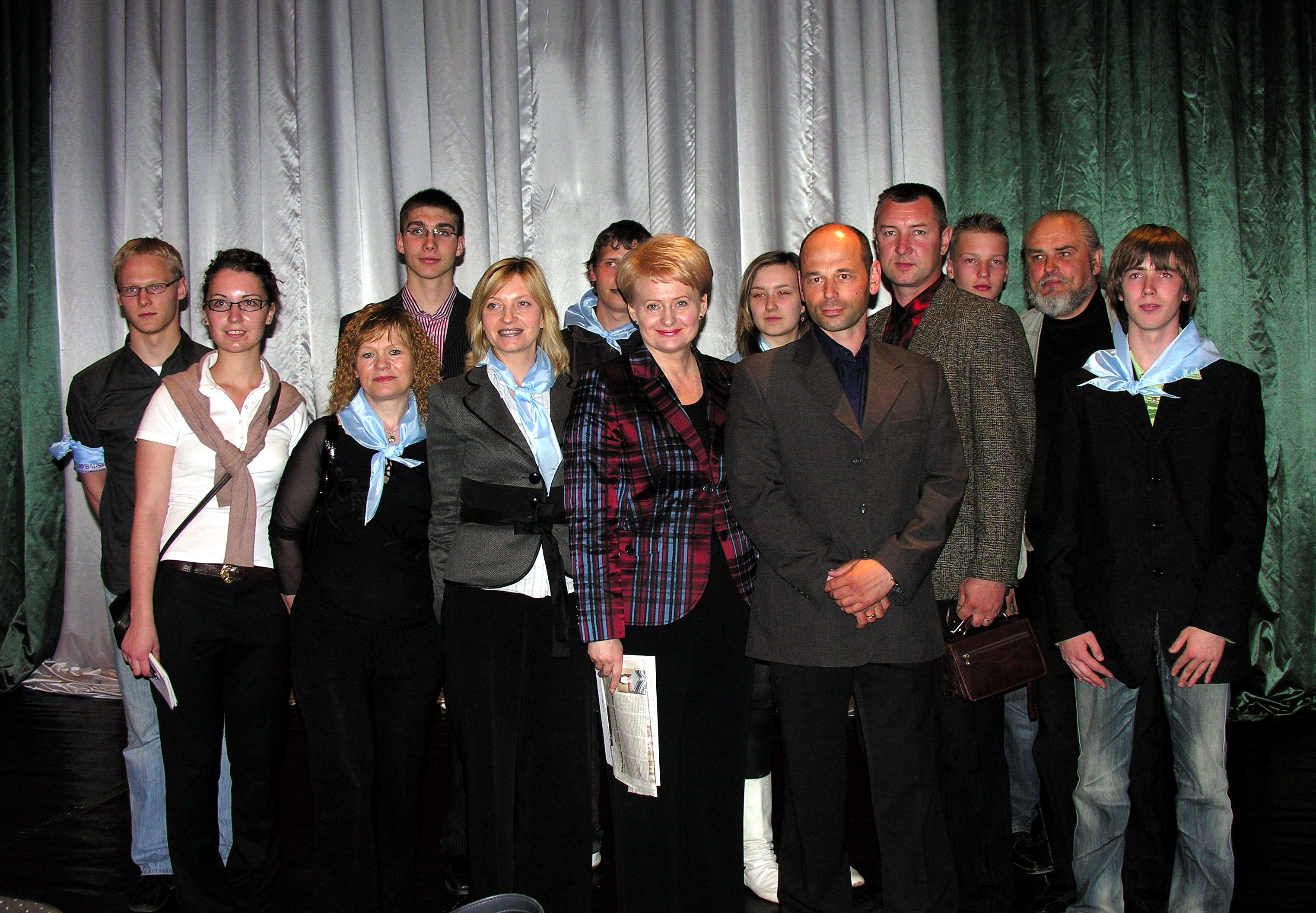 Dalia Grybauskaitė susitikimo metu su rinkėjais Mažeikiuose